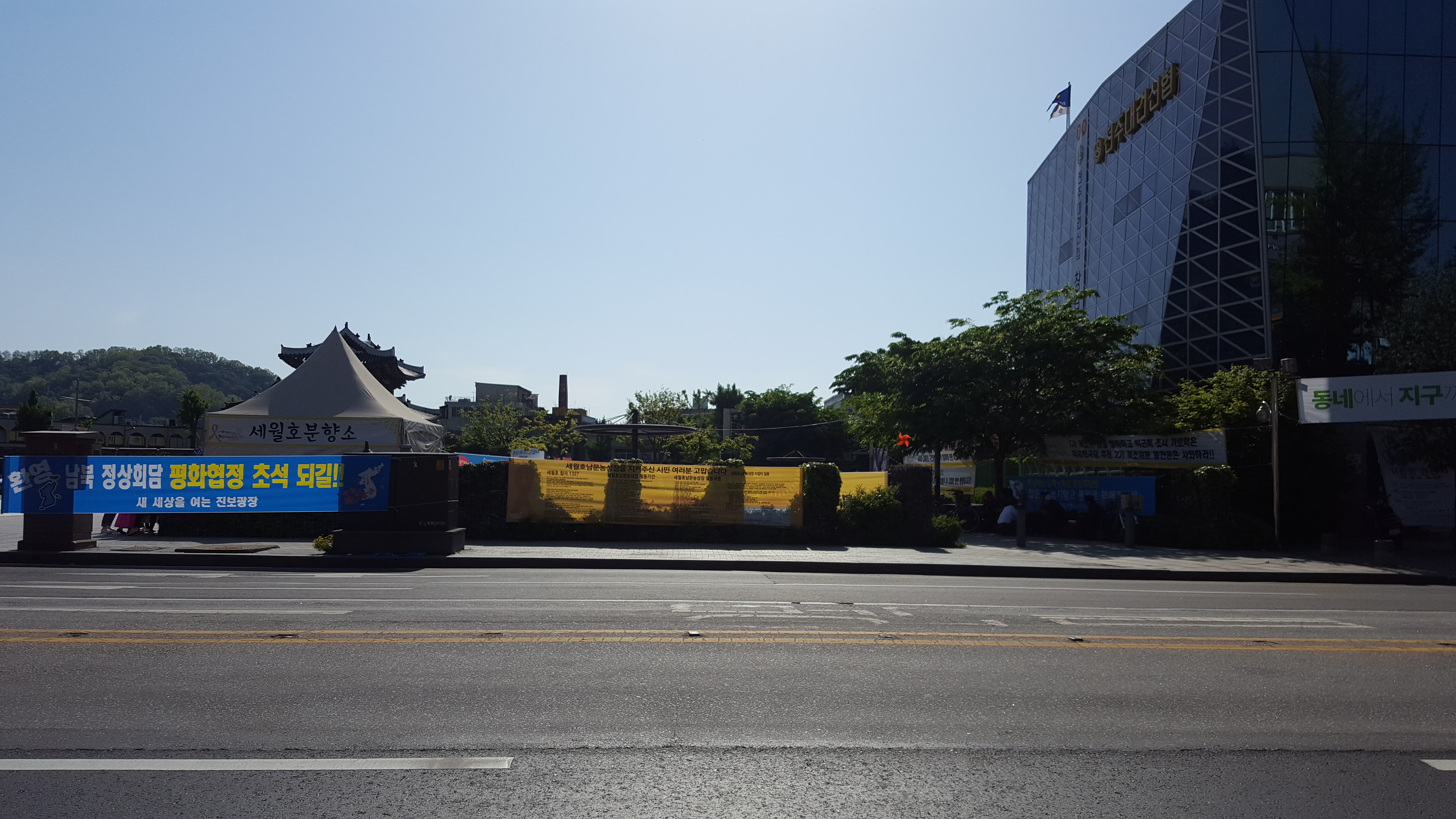 이틀남은 2018년 남북정상회담 성공을 기원하는 현수막